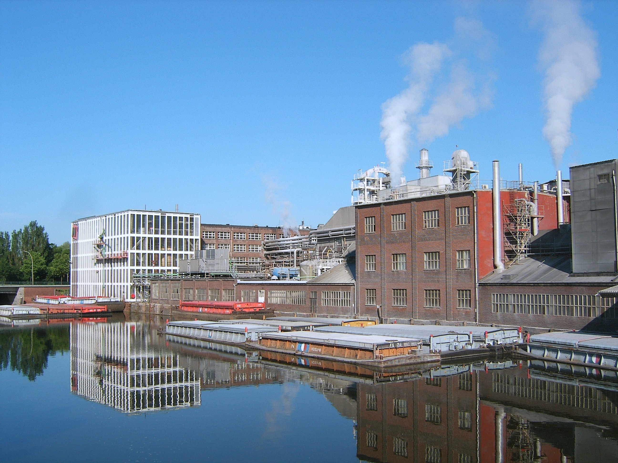 Stärke-Fabrik an der Bille in Hamburg-Hammerbrook.